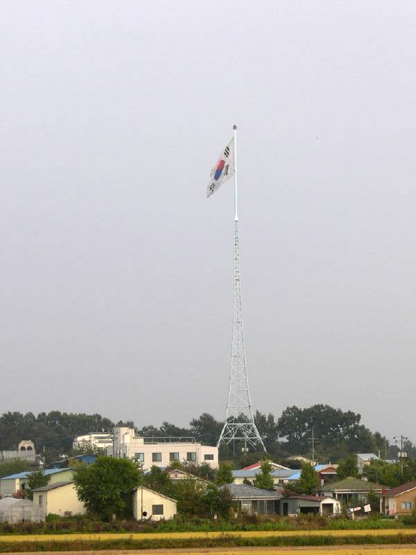 대성동 마을의 풍경